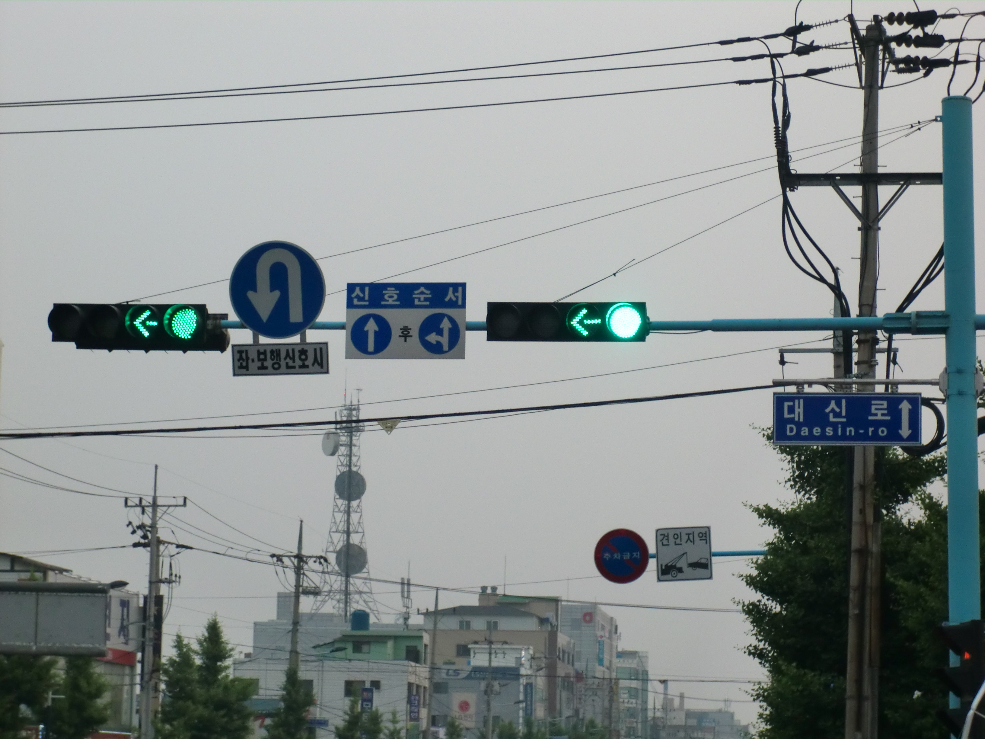 四色式信号機（青と青左矢印の同時進行）慶尚南道晋州市晋州消防署前で撮影